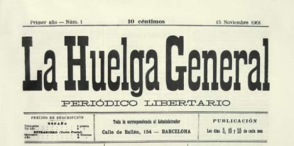 Le 15 novembre 1901, à Barcelone, le pédagogue Francisco Ferrer publie le premier numéro du periodique libertaire "La Huelga General" (La Grève Générale).